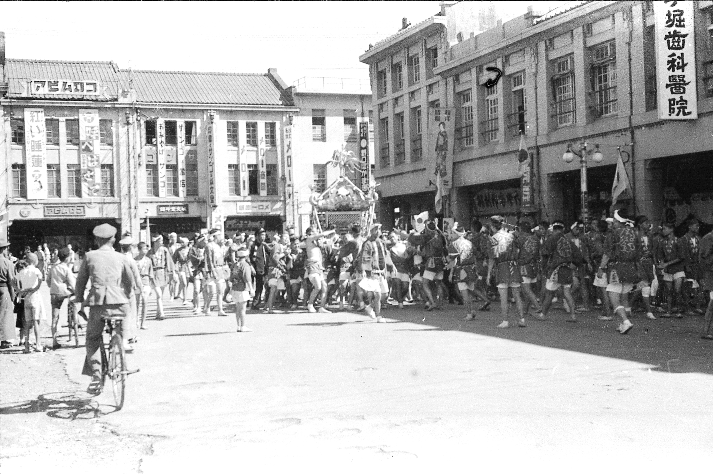 中文（台灣）: 臺灣神社祭典遊行活動，臺北本町。